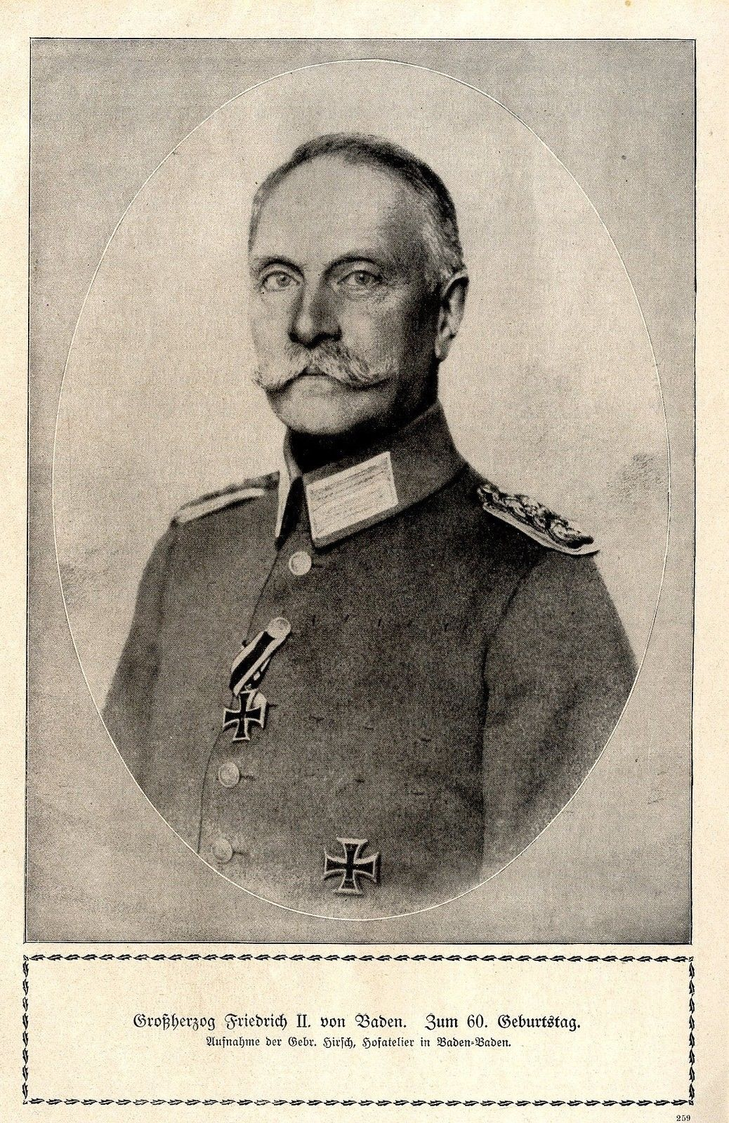 Großherzog Friedrich II. von Baden zum 60. Geburtstag, 1917